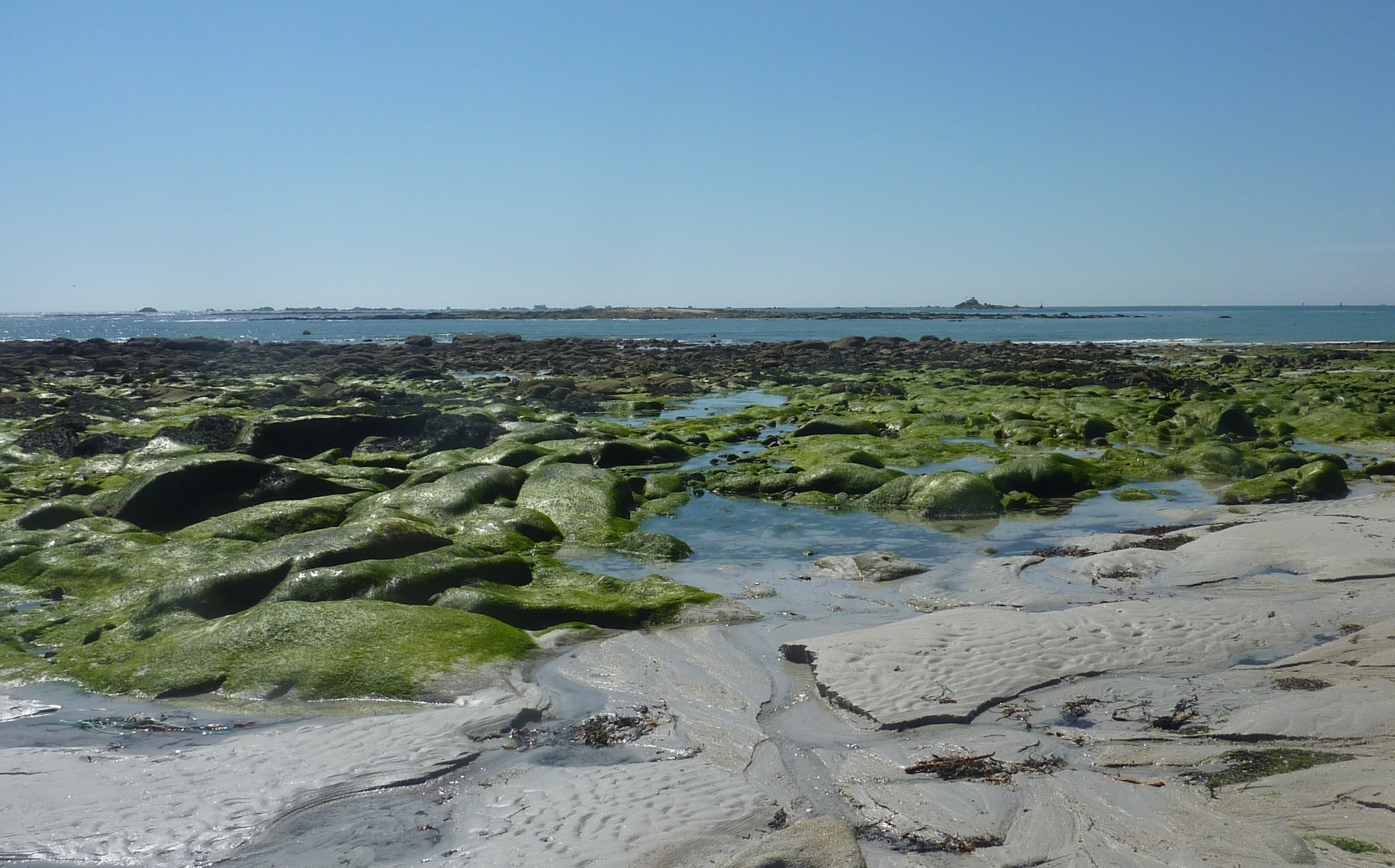 Les rochers des Étocs face à Penmarch vus de la plage du Ster Poulguen